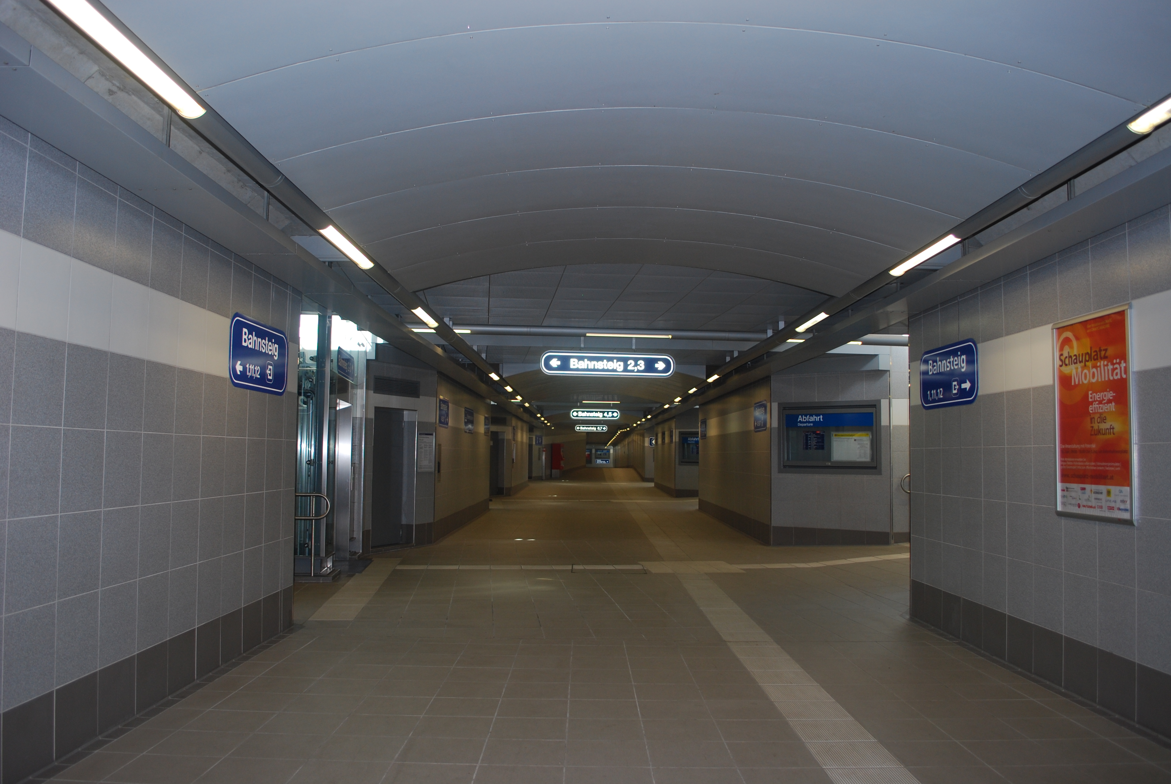 Unterführung St.Valentin